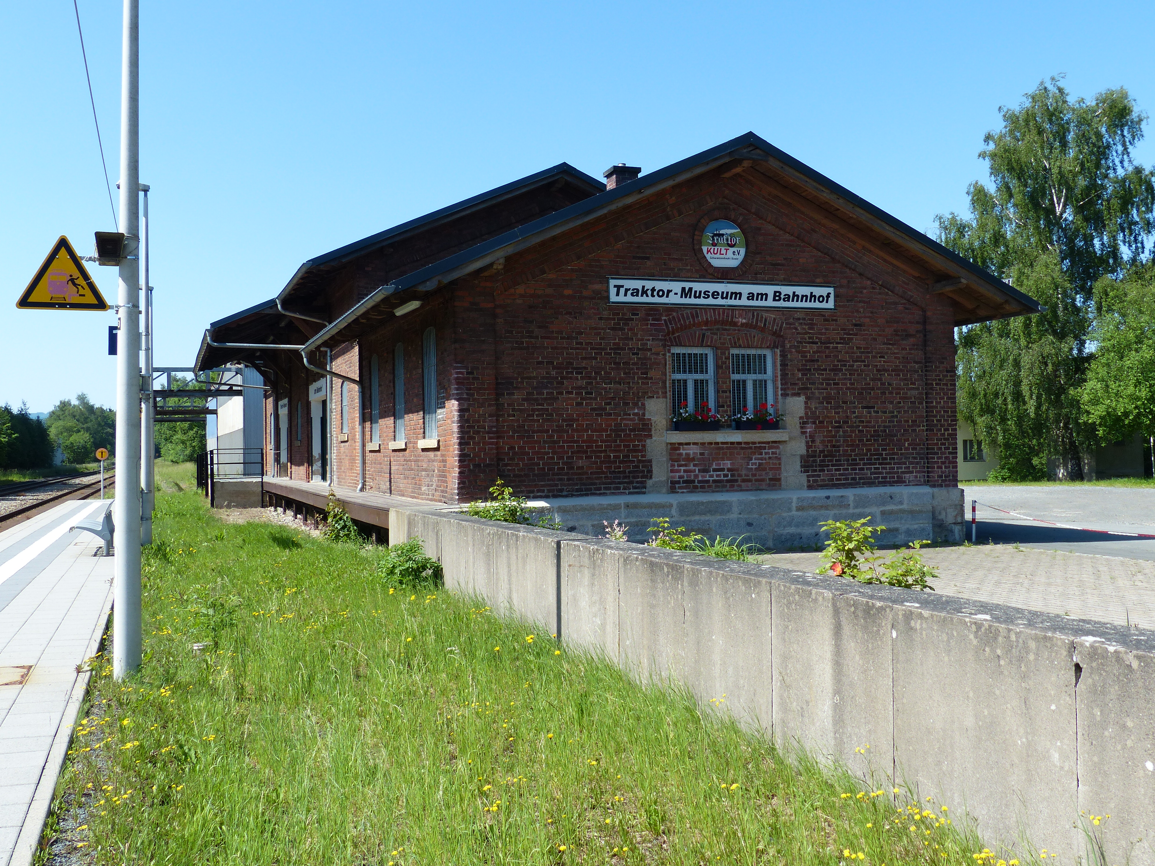 Gebäude in der Stadt Schwarzenbach an der Saale